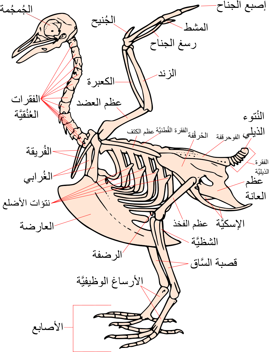 رسمٌ بيانيٌّ يُوضح أقسام الهيكل العظمي عند الطائر.